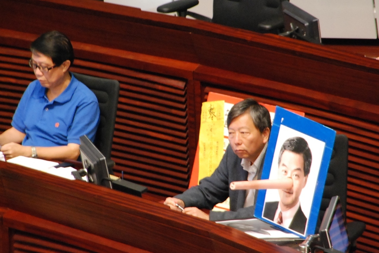 支联会主席、工党立法会议员李卓人（右）在行政长官答问大会展示讽刺梁振英说谎的照片。